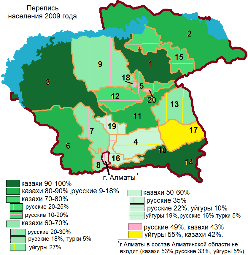 Этнический состав населения Алматинской области по данным переписи 2009 года